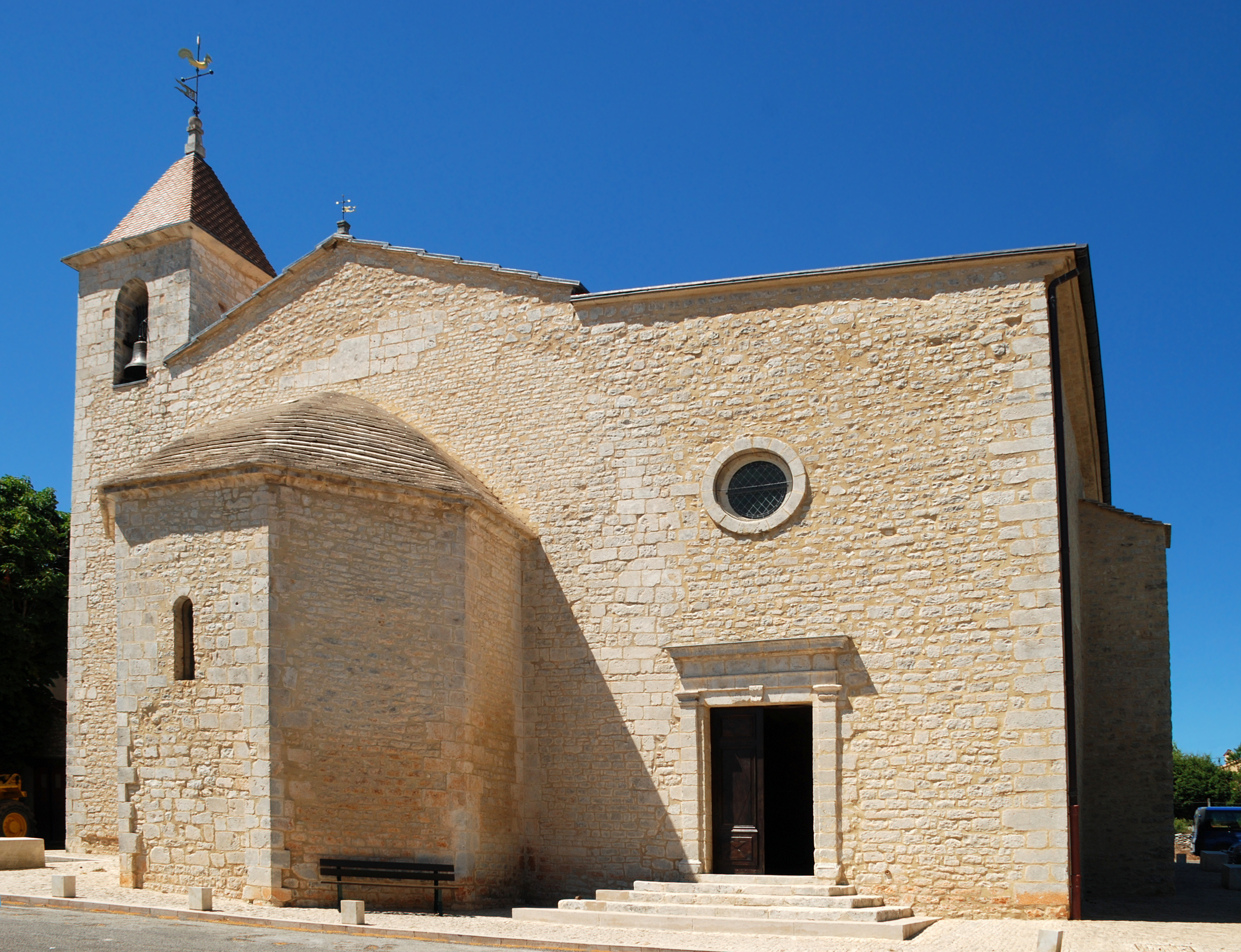 France - Provence - Vaucluse - Église Notre Dame-et-Saint-Christophe de Saint-Christol